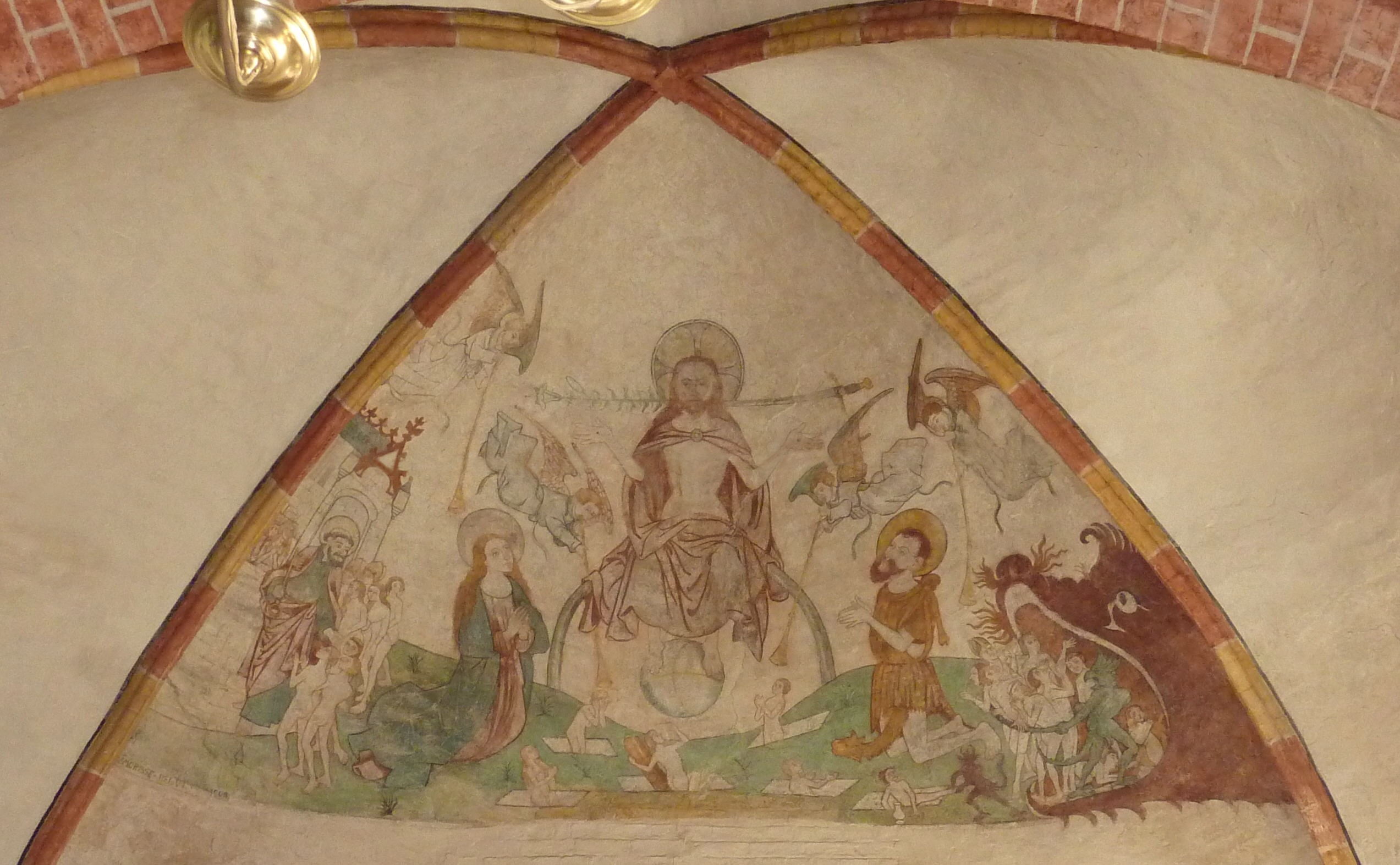 Fresko in St. Johannes, Bad Zwischenahn